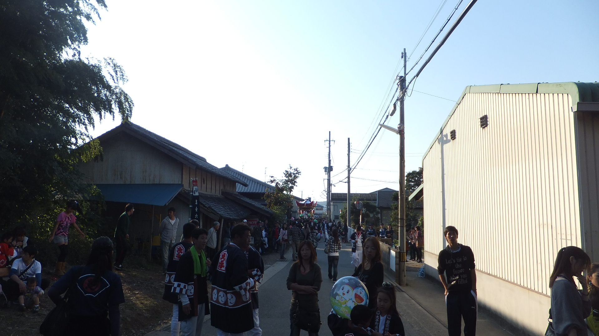 岩壺神社祭礼